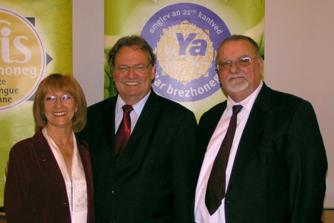 (de gauche à droite) Lena Louarn, présidente de l'Ofis de la langue bretonne, Charles Gautier, sénateur-maire PS de Saint-Herblain et Michel François, conseiller municipal UDB de Saint-Herblain, lors de la signature de la charte « Ya d’ar brezhoneg » par la Ville de Saint-Herblain le 15 mai 2009 à l'hôtel de ville.